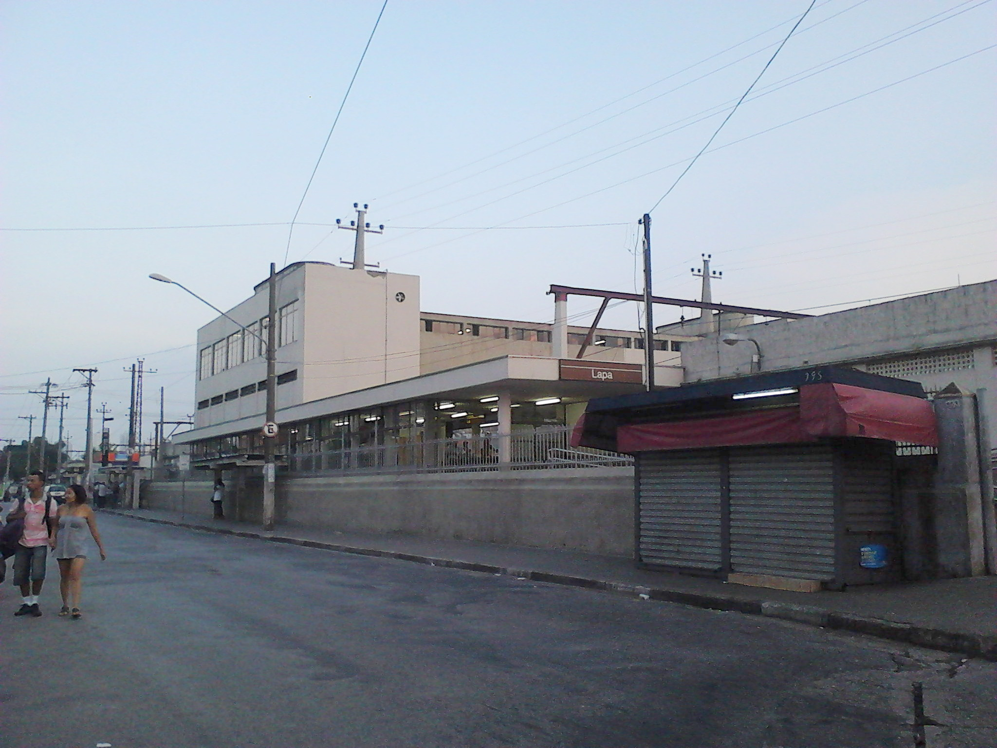 Estação Lapa, da Linha 7 da CPTM. Lapa, São Paulo, Brasil.